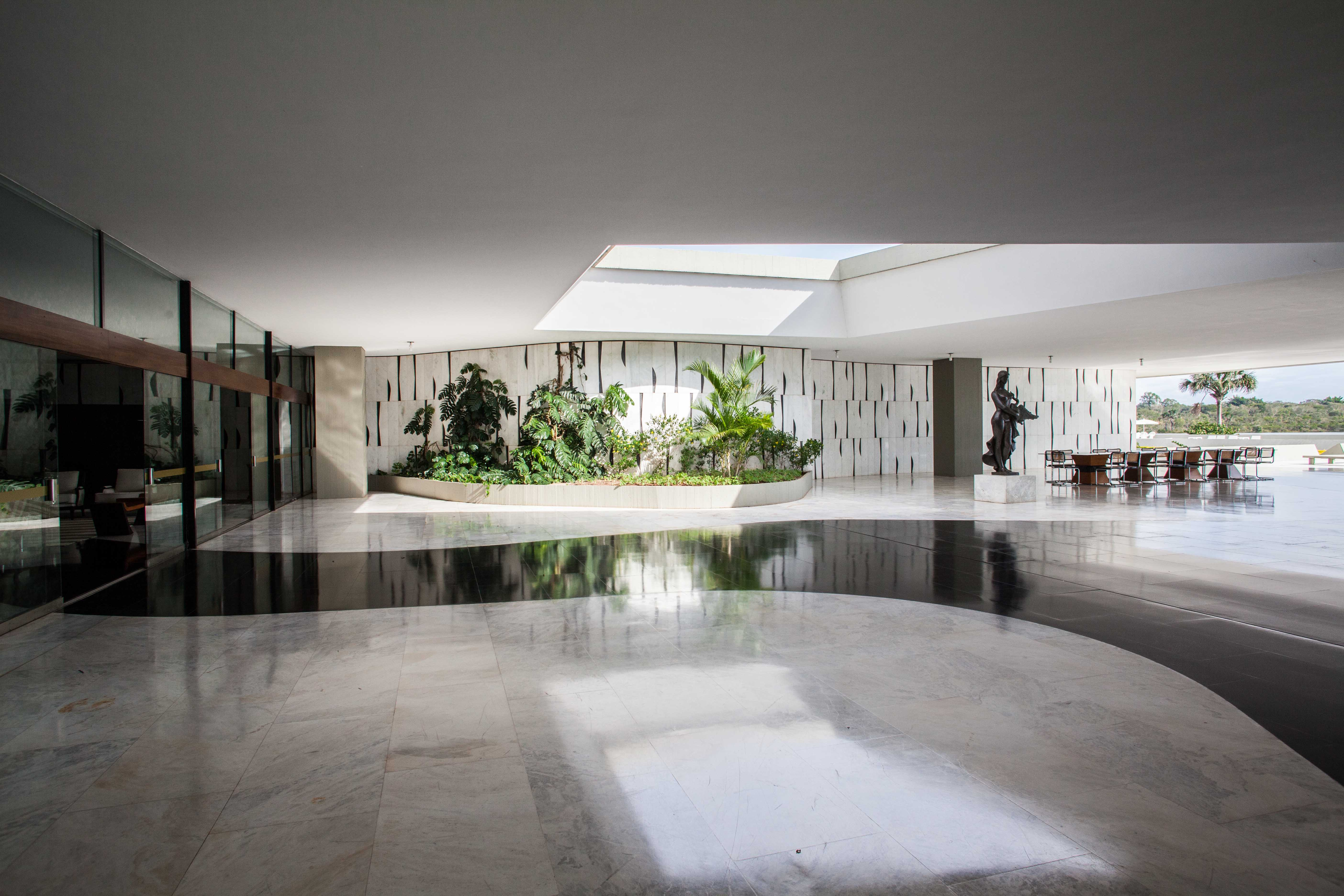 Palácio do Jaburu - Pátio interno Foto: Julia Maass